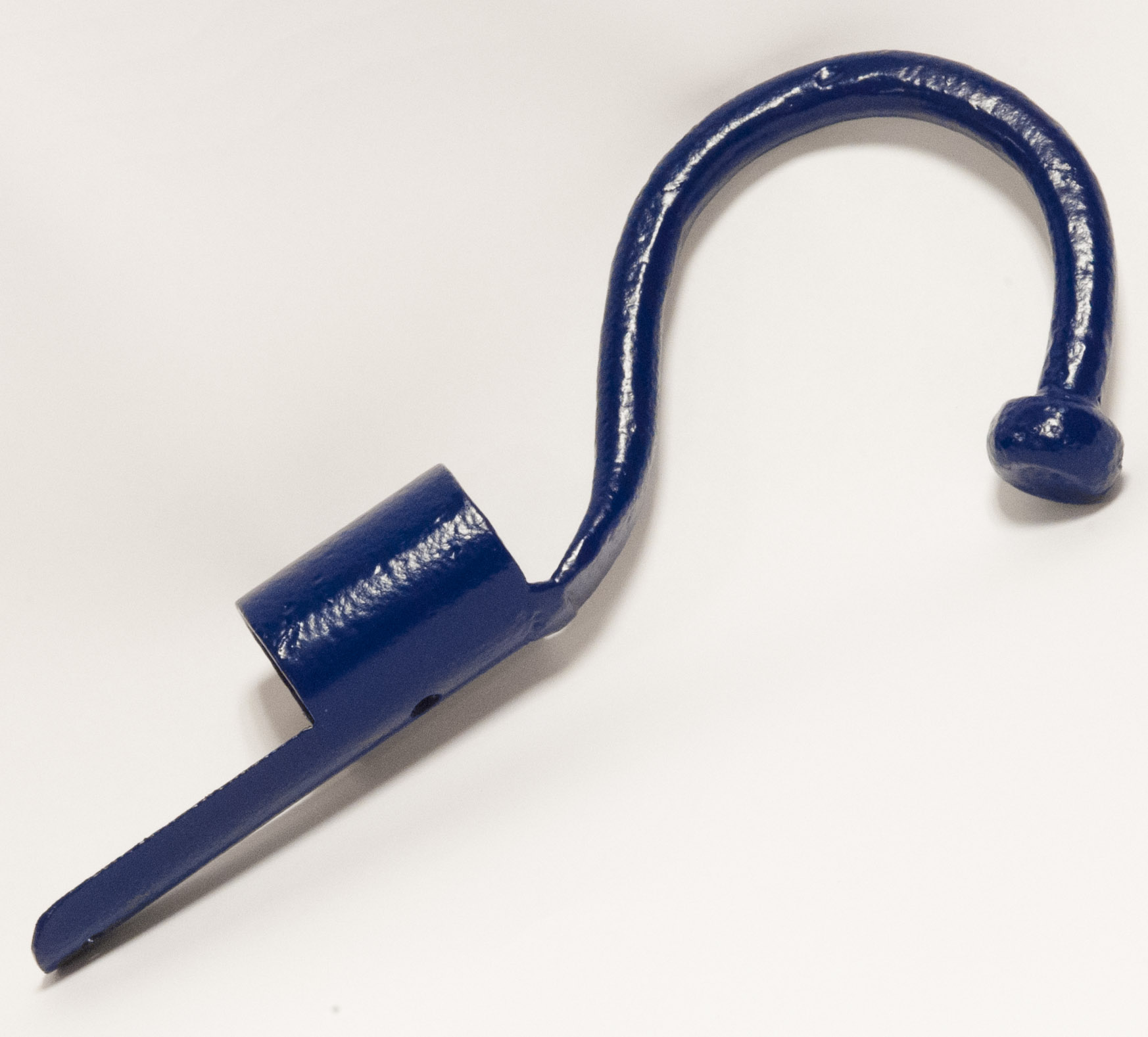 Boat hook